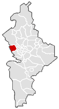 Ubicación geográfica del municipio de García en el estado mexicano de Nuevo León.